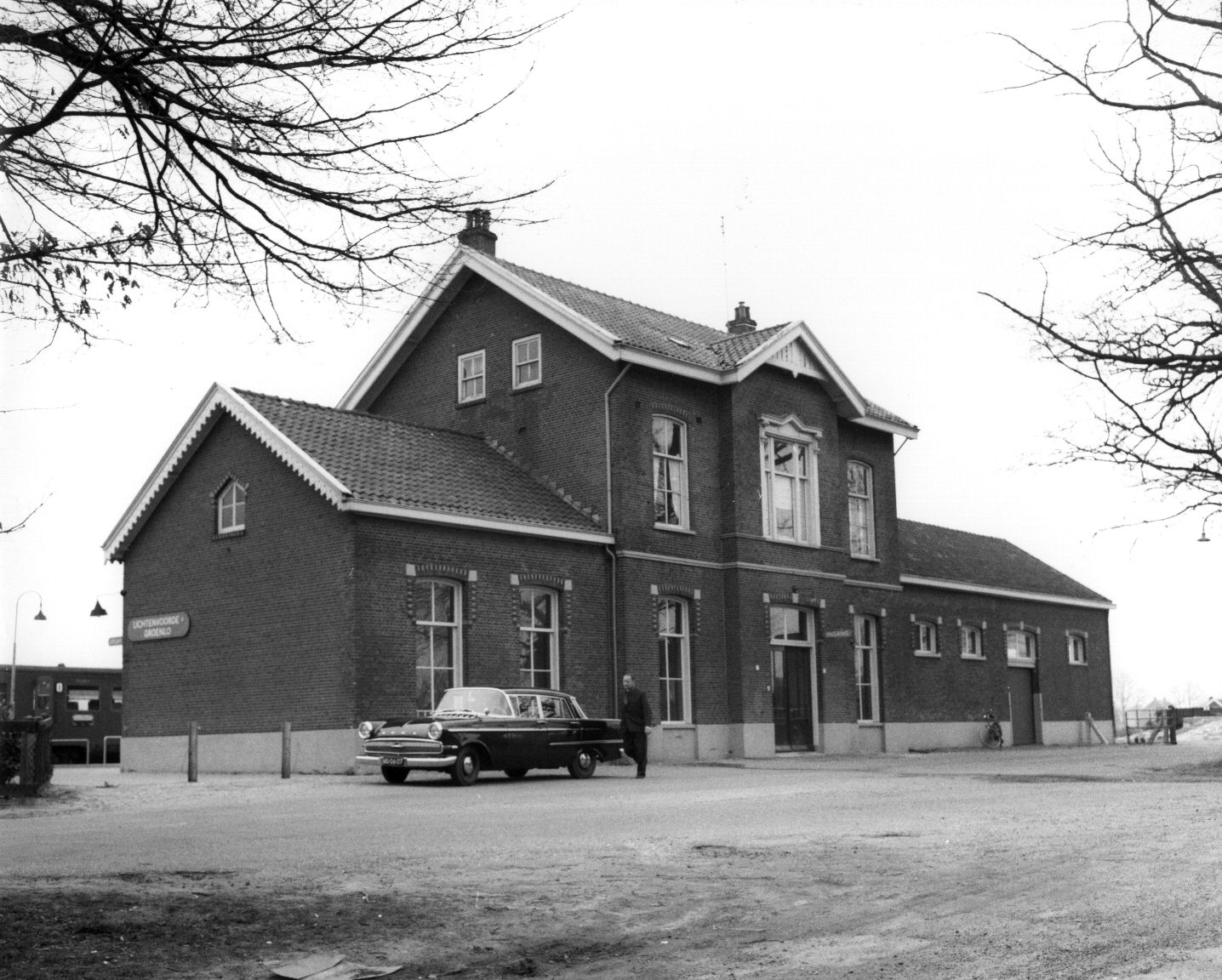 Gezicht op het N.S.-station Lichtenvoorde-Groenlo te Lievelde.